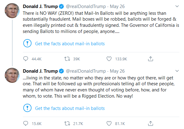 Първият случай на поставяне на етикет за недостоверност на информацията на съобщение на 45-тия президент на САЩ в Twitter